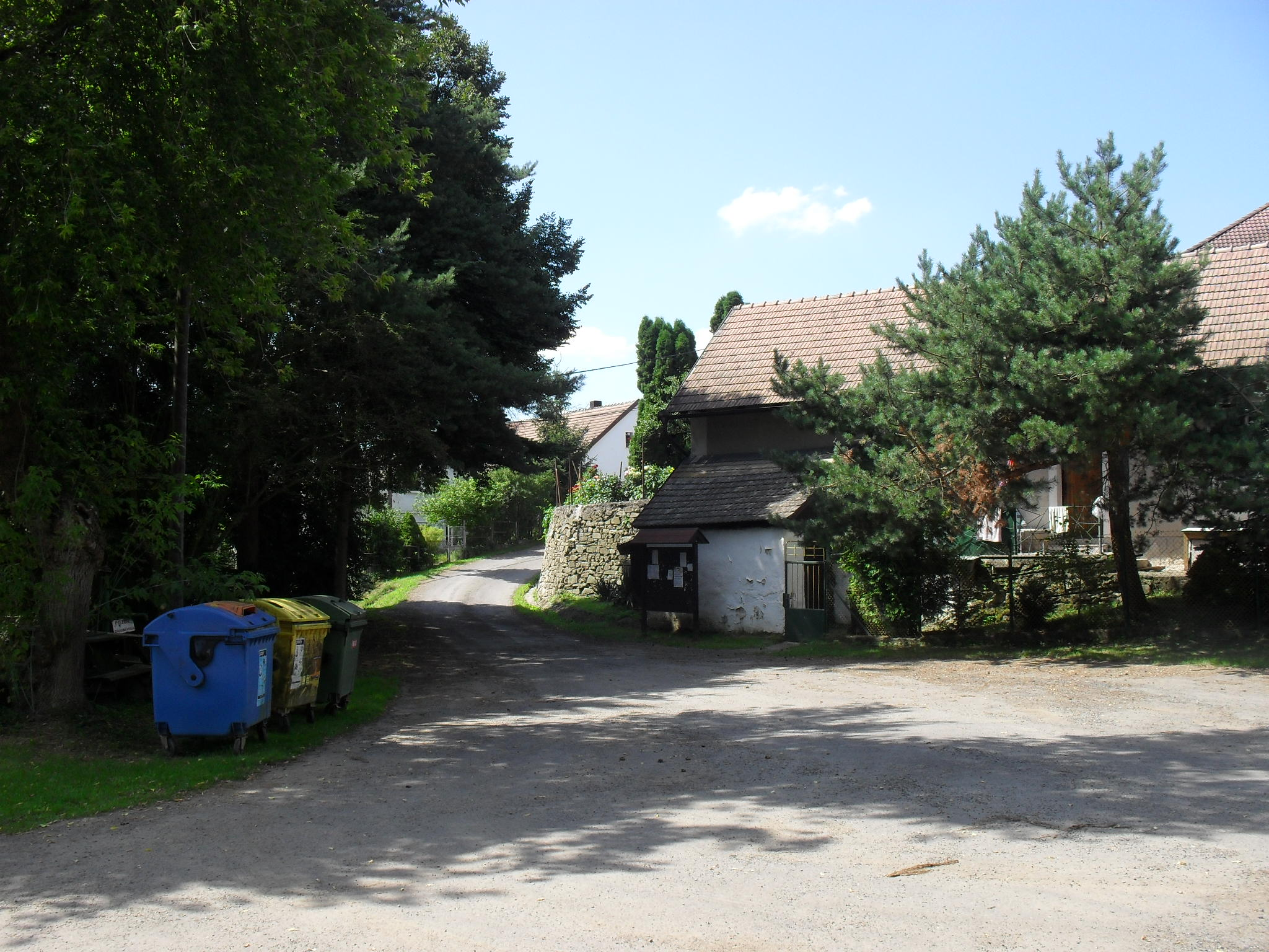 Náves v Žíňánkách